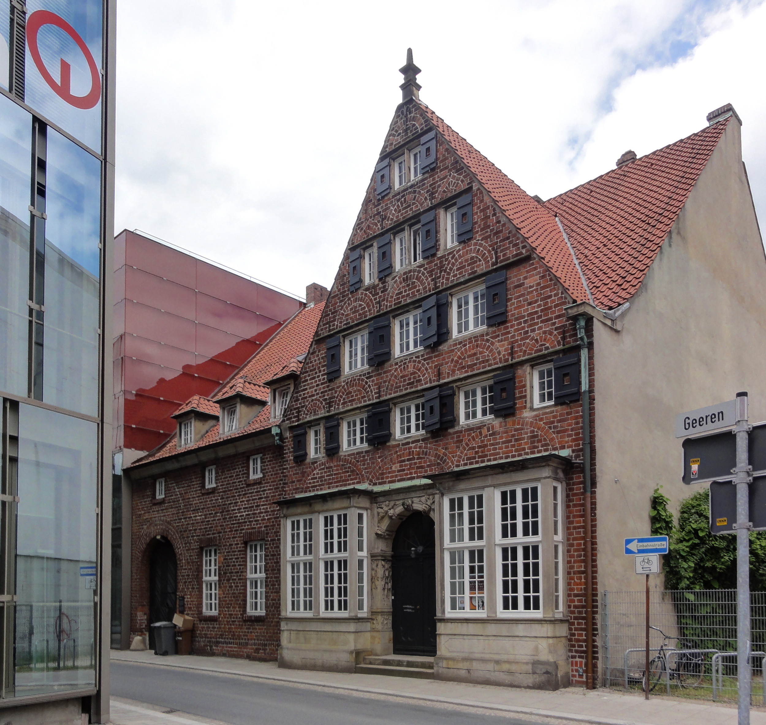 Architektenkammer in Bremen, Geeren 41Das abgebildete Objekt ist ein geschütztes Kulturdenkmal in der Freien Hansestadt Bremen, mit der Nr. 0424 beim Landesamt für Denkmalpflege registriert.